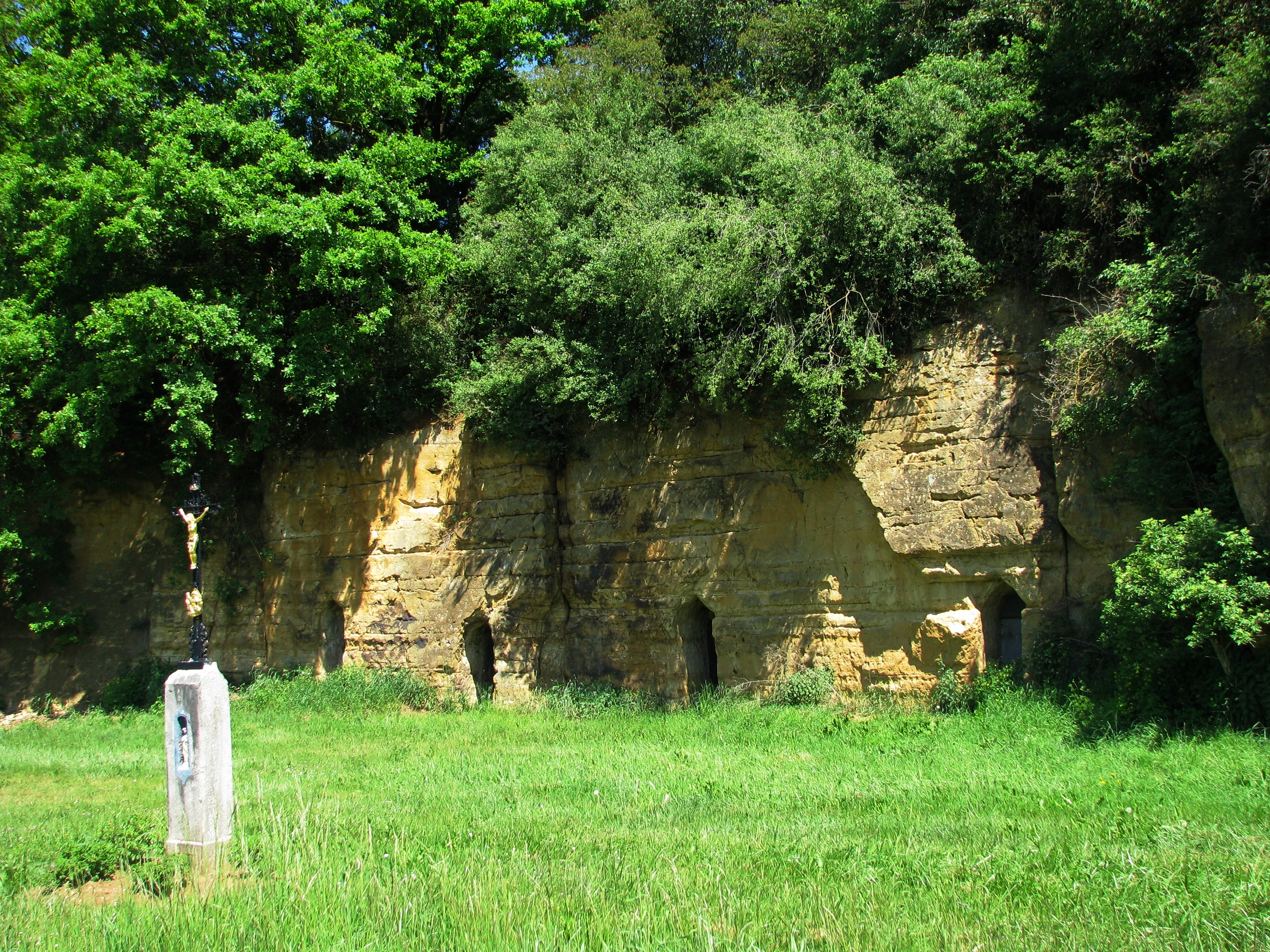 Niederhofen, Ortsteil von Pilsach im Landkreis Neumarkt i. d. Opf., Doggerfelswand